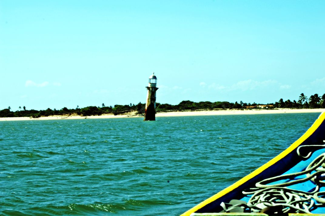 Farol de Peba (São Francisco do Norte, Cabeço), Segipe, Brasil